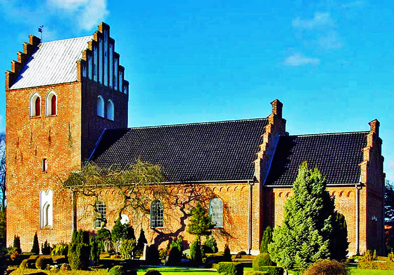 fra syd